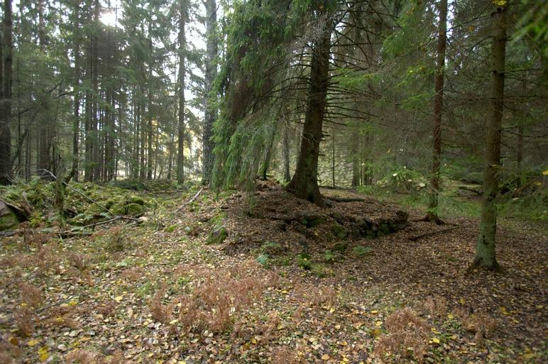 Grund efter boningshus till torpet Abrahamsmåla. Motiv: Bockaskruv Nyckelord: Naturreservat Kategori: Skogslandskap Grund efter boningshus till torpet Abrahamsmåla.